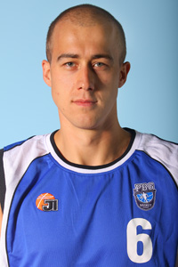 Hubert Radke